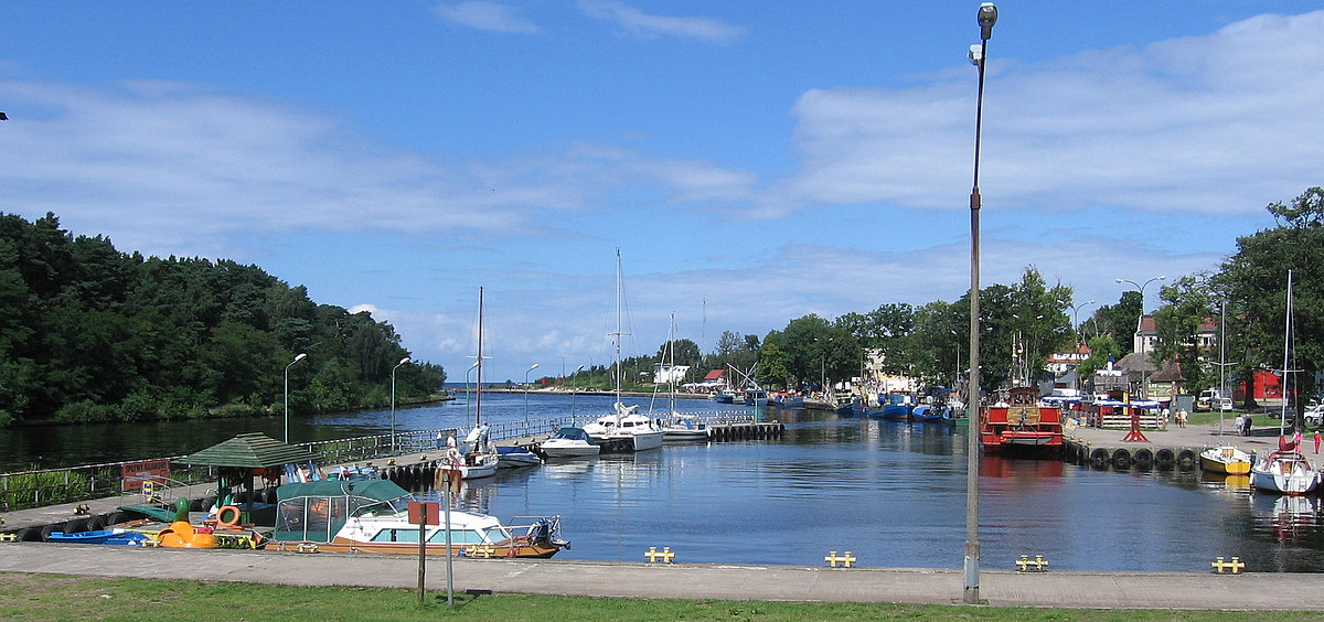 Przystań jachtowa w Mrzeżynie (zachodniopomorskie)